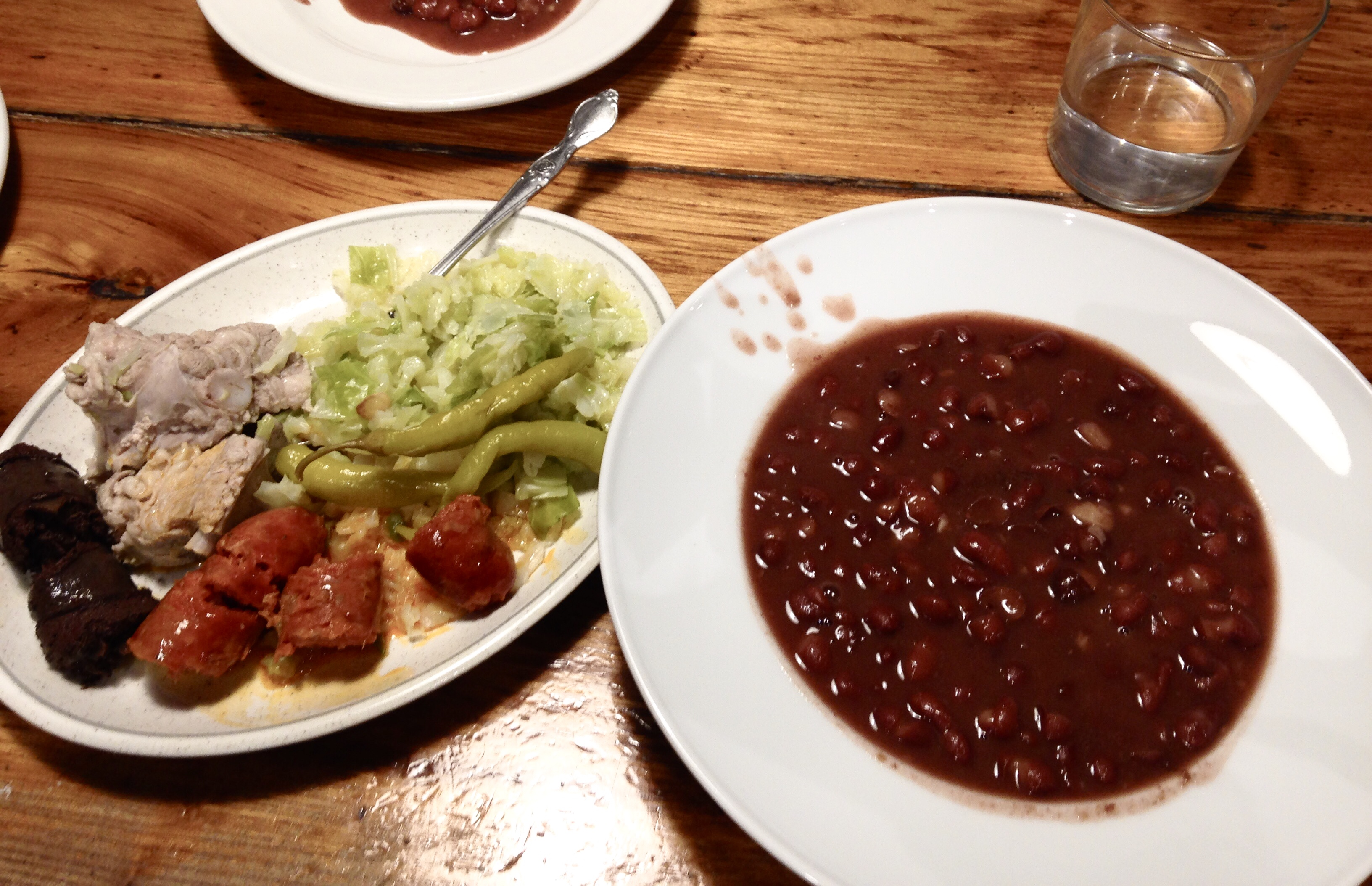 Sakramentuak (aza, piperminak, txorizoa, odolkiak eta txerrikia) babarrunekin jateko